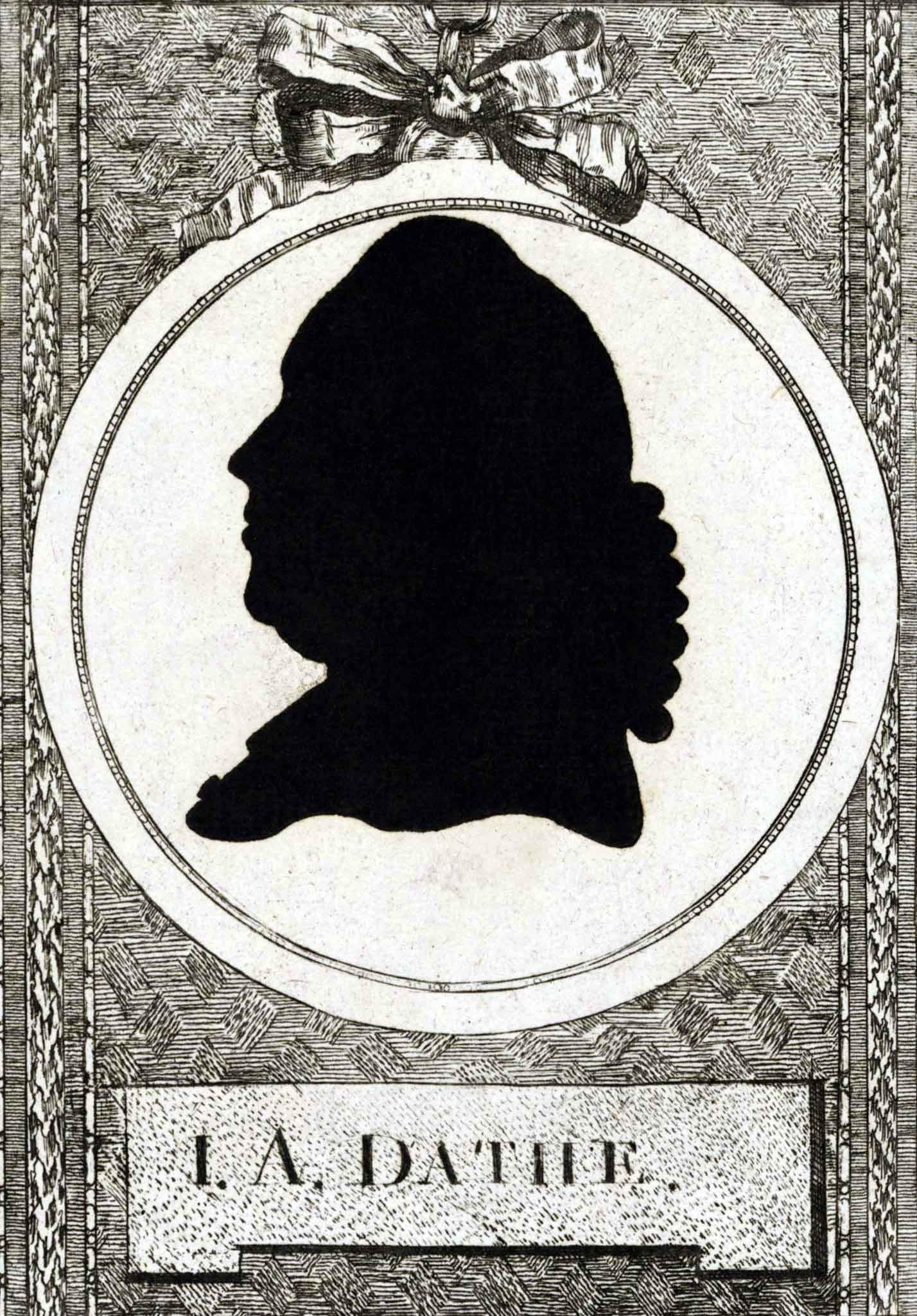 Johann August Dathe (auch: Dathius, Leucopetraeus ;1731-1791) war ein deutscher Philologe und evangelisch-lutherischer Theologe.